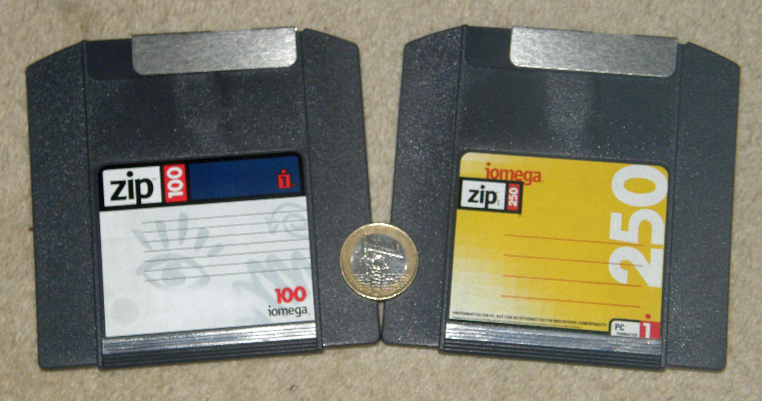 zip-Disketten.